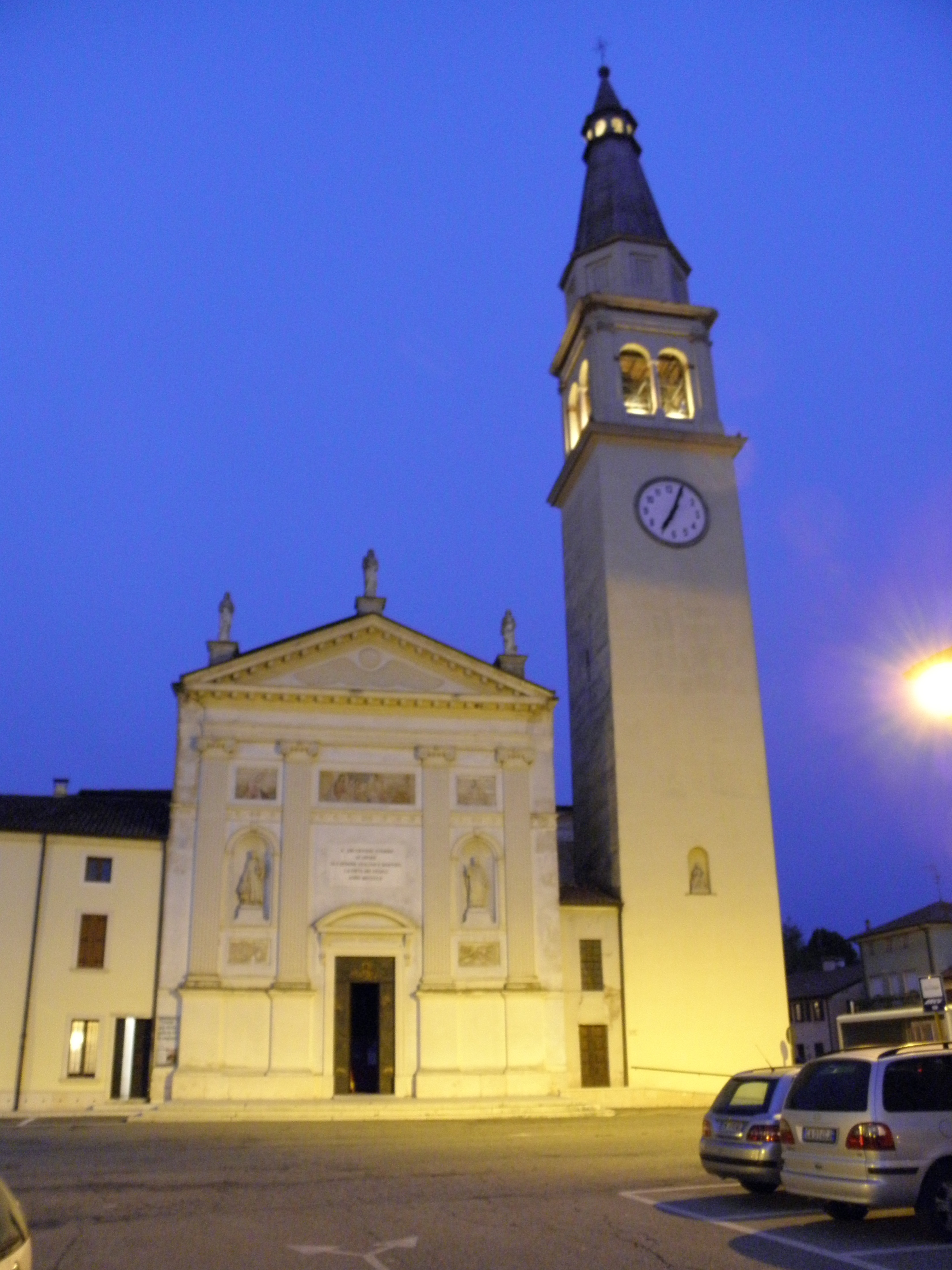 Roverchiara, la chiesa parrocchiale di San Zeno Vescovo in tarda serata.